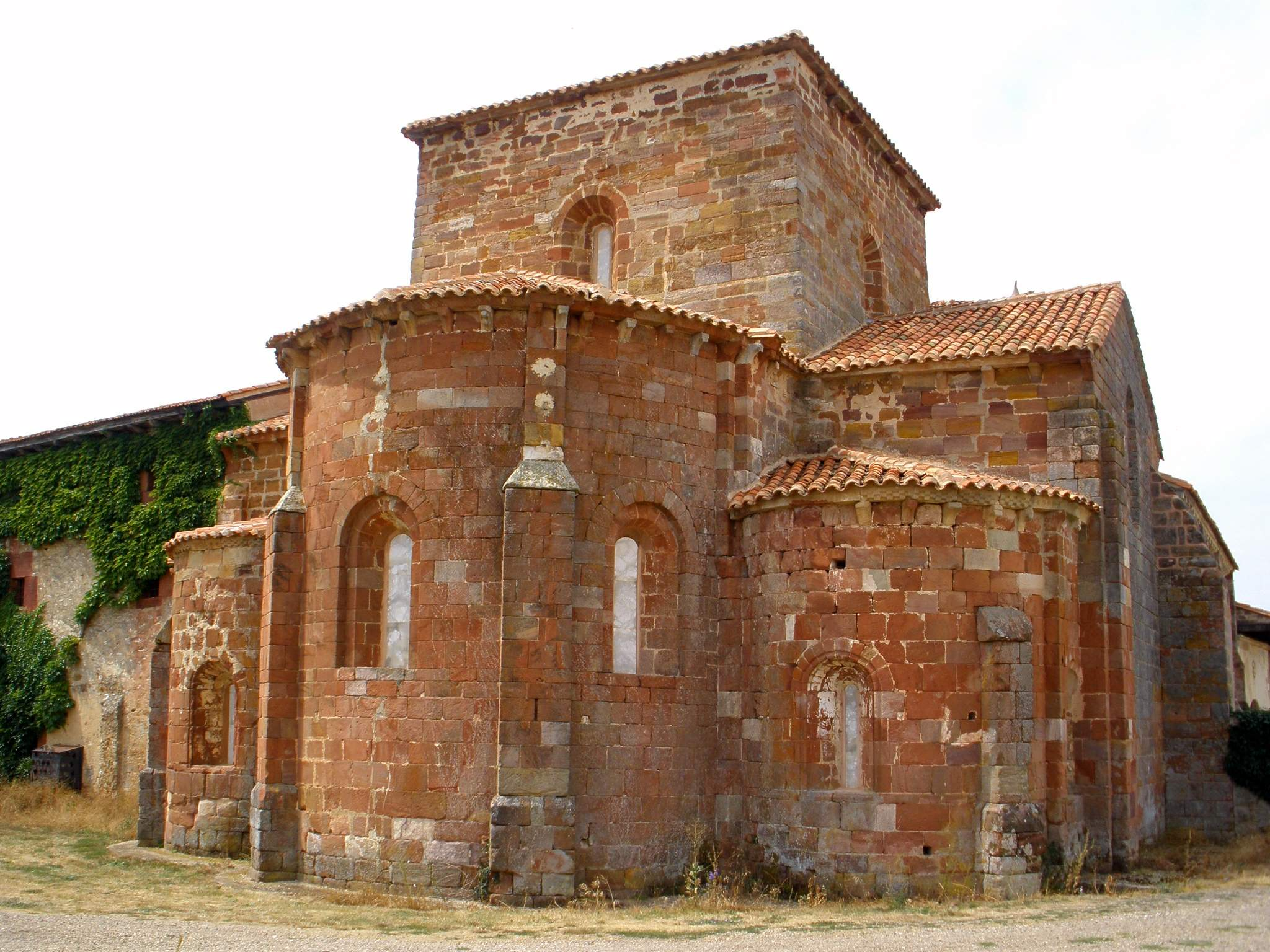 Monasterio de Santa María la Real, Mave (Palencia)